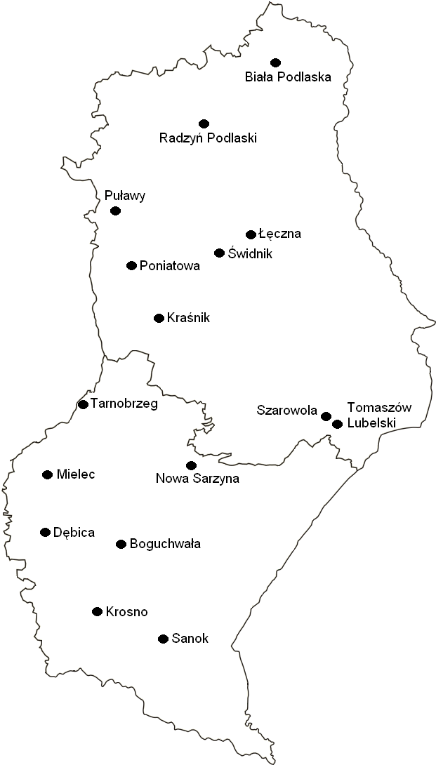 Mapa miejscowości, z których drużyny grają w III lidze grupa lubelsko-podkarpacka